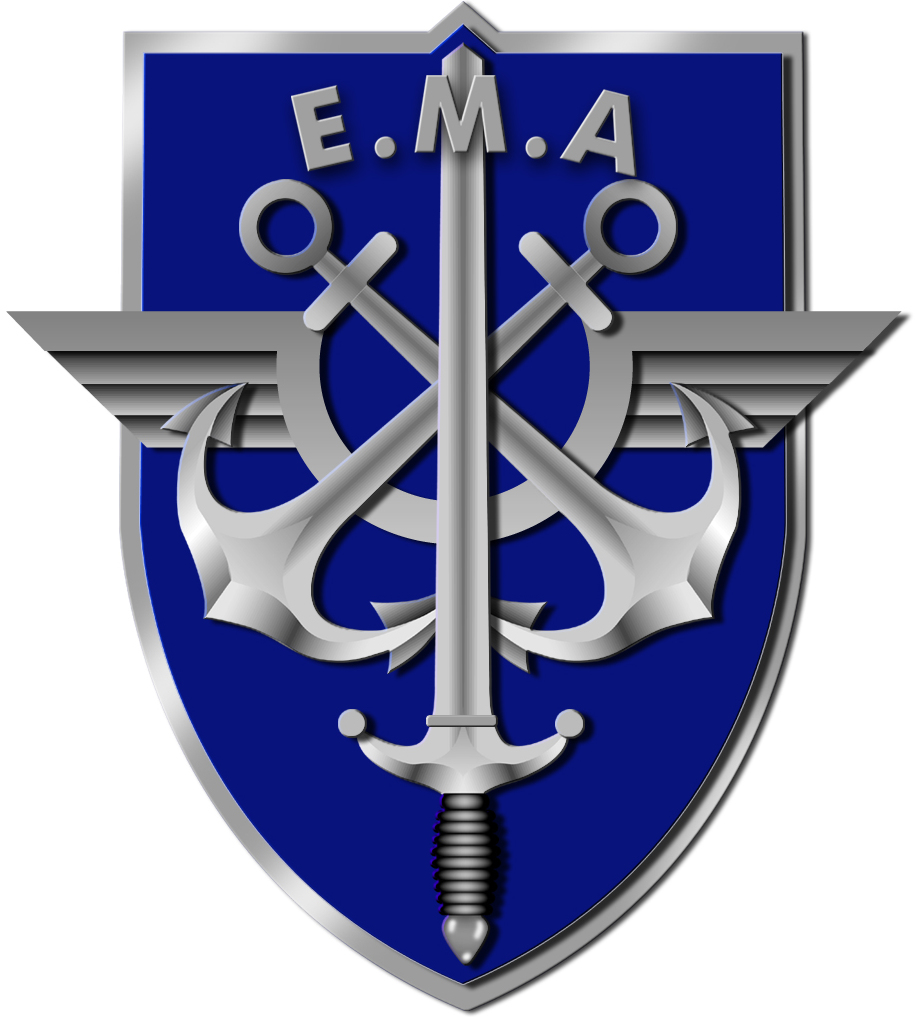 Logo de l'EMA